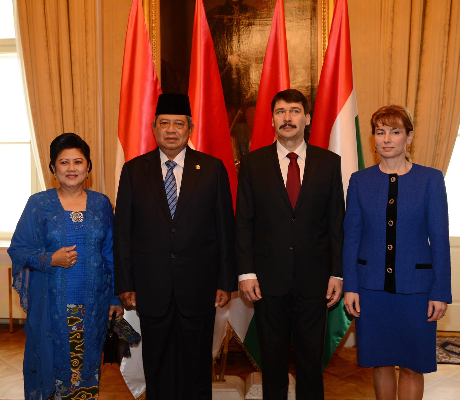 Presiden SBY dan Ibu Ani Yudhoyono diterima Presiden Janos Ader dan Ibu Anita Herczegh di Istana Sandor, Budapest, Hungaria, 6 Maret 2013.